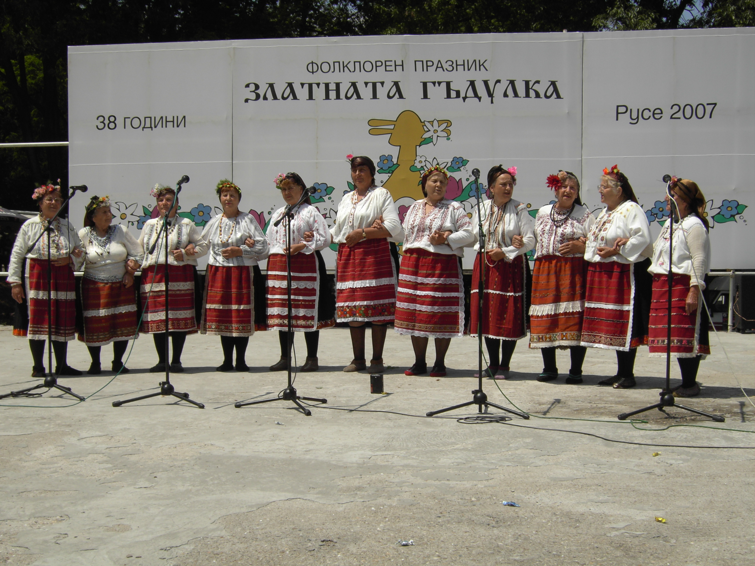 Фолклорна група от Бръшлен